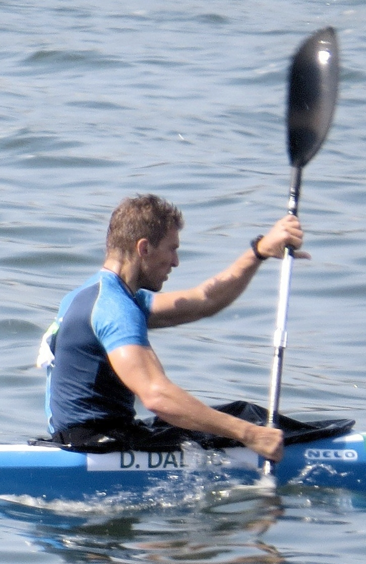 Sx50